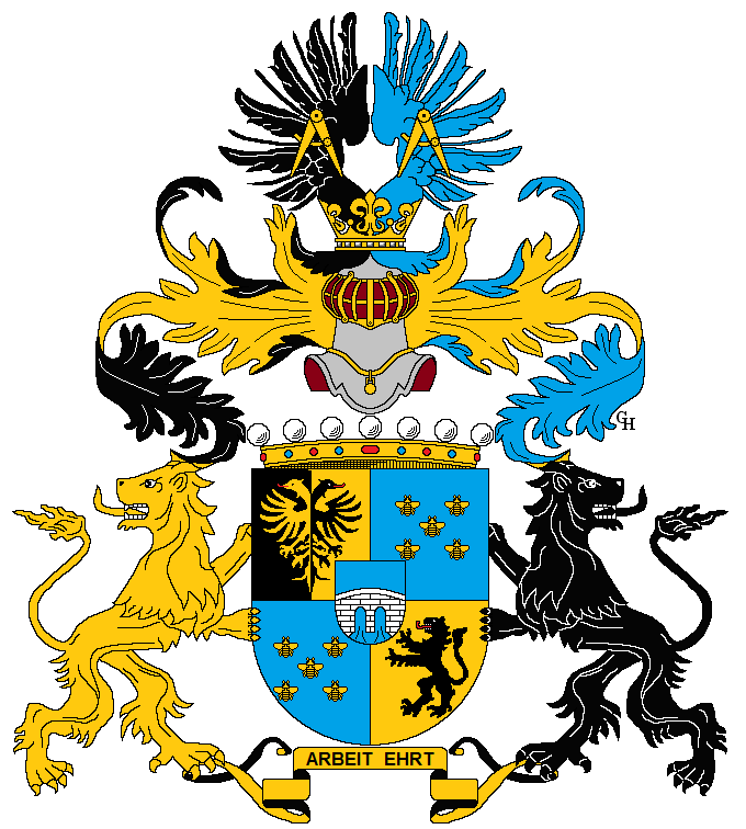 Wappen des österreichischen Bauunternehmers und Mäzens Carl von Schwarz (1817–1898), verliehen anlässlich seiner Erhebung in den österreichischen Adelsstand 1869, hier in der Version nach seiner in den österreichischen Freiherrenstand 1872. Zeichnung von Gerd Hruška ( Für weitere Informationen zu dieser Standeserhebung siehe (